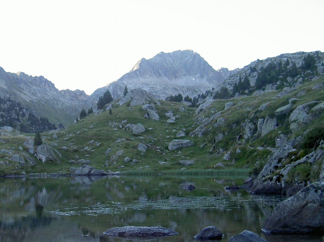 Vista del Pico o Tuc de Ratera